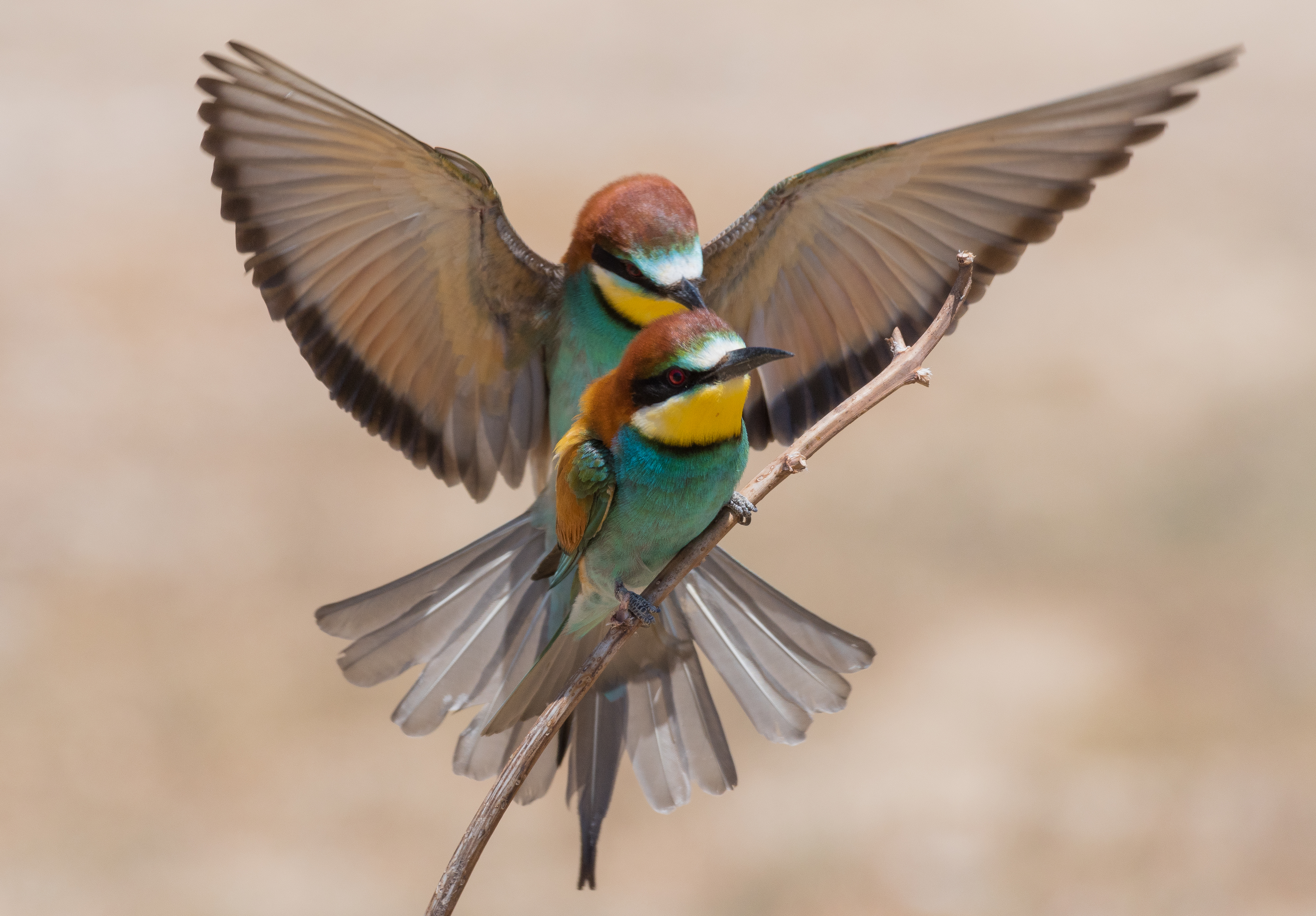 guépier d'europe au parc national de l'Ichkeul